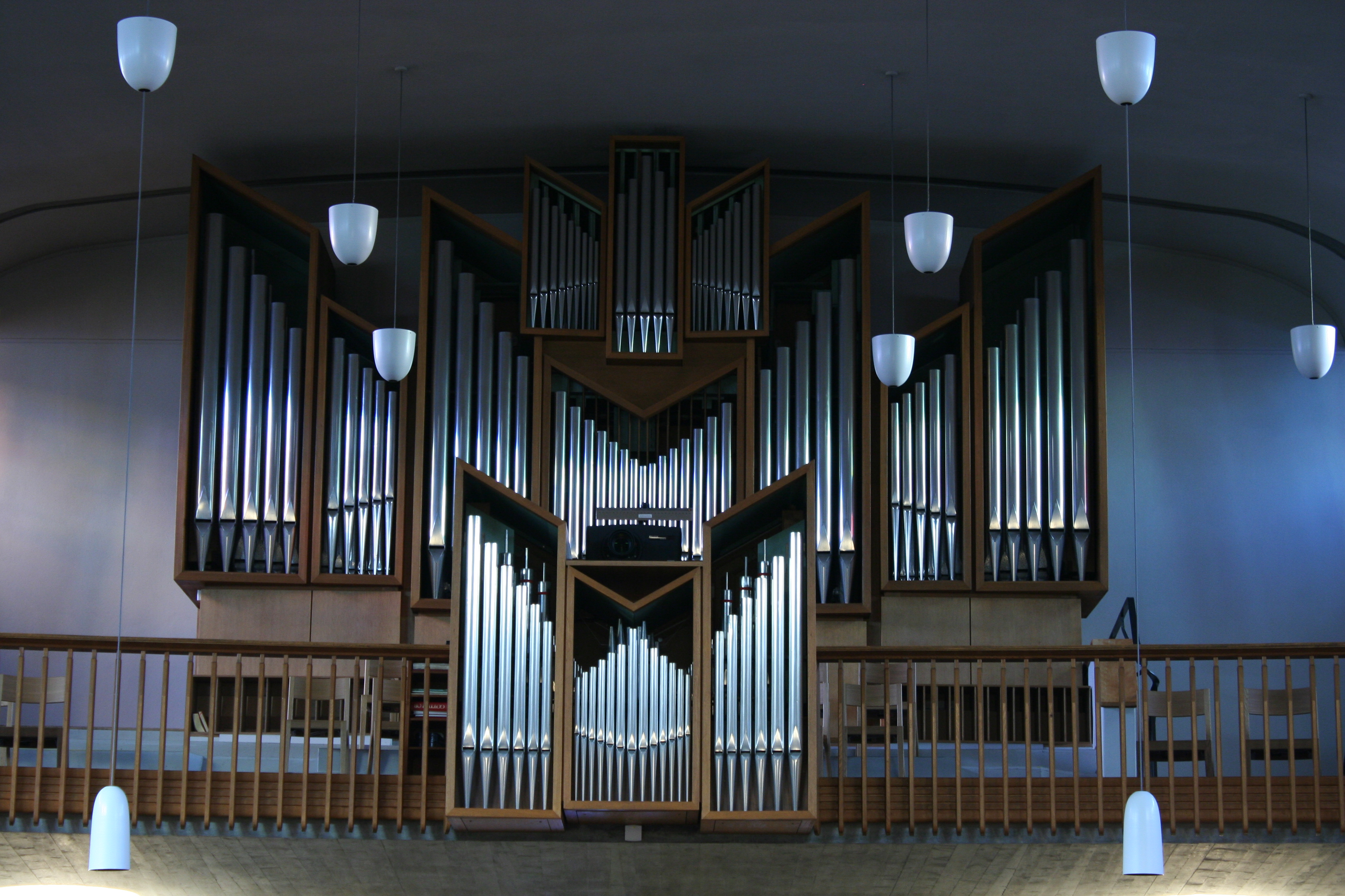 Römisch-katholische Pfarrkirche St. Felix und Regula, Orgel